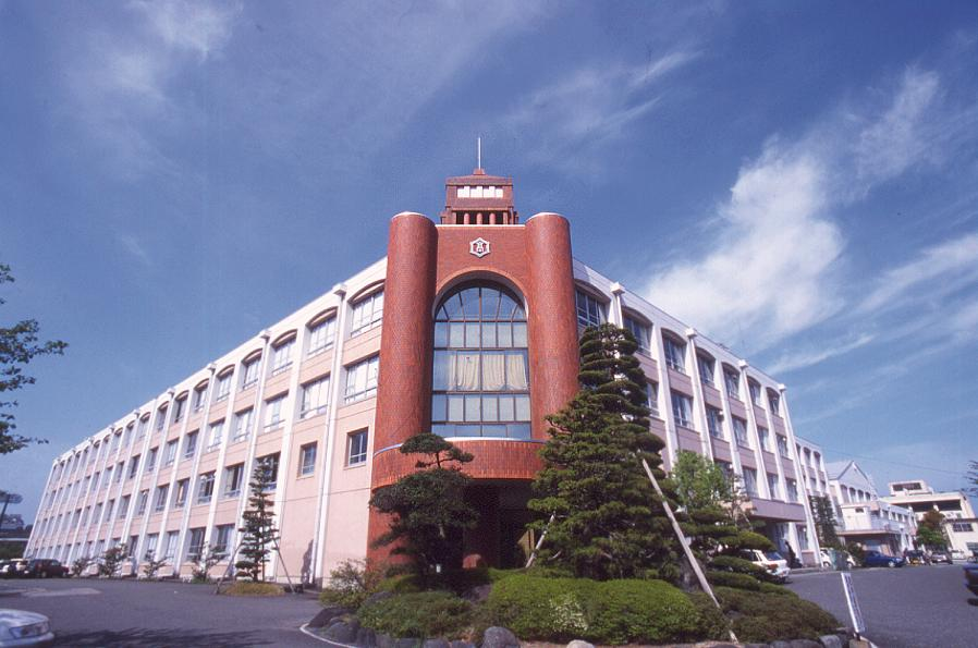 近江高校の正面玄関前から撮影した画像です